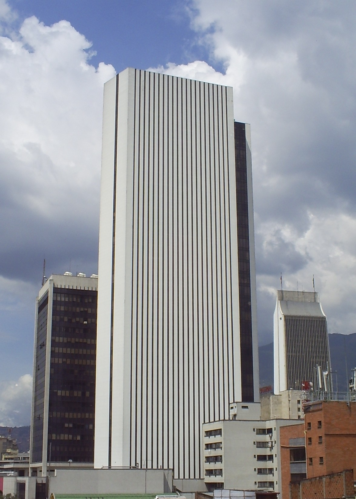 Torre del Café, Medellín, Colombia.